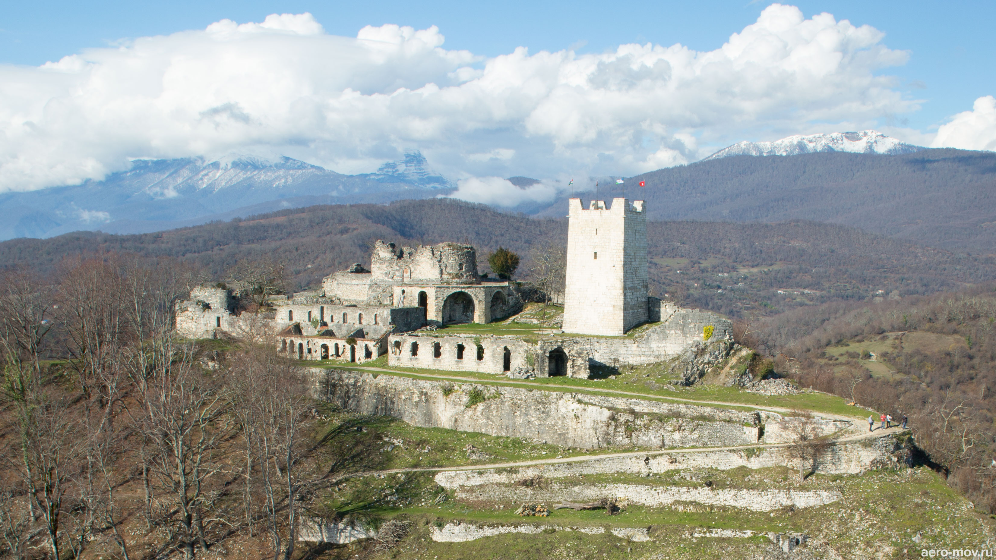 Фотография развалин Анакопийской крепости, февраль 2016 года.